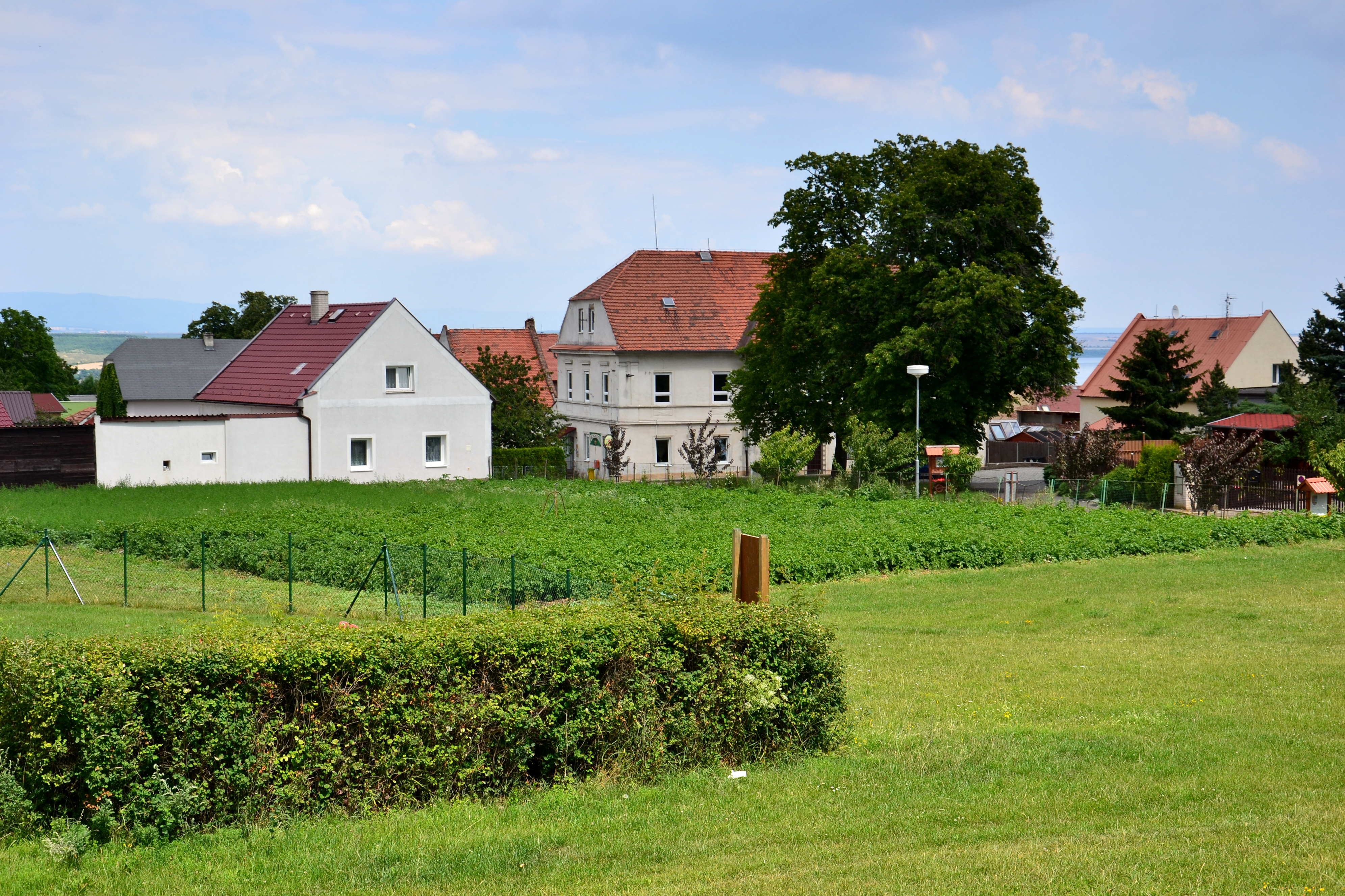 Poláky - pohled z cesty k nádraží